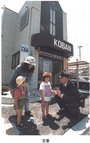 平性9年 警察白書